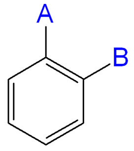 Ortho-positie bij aromaat